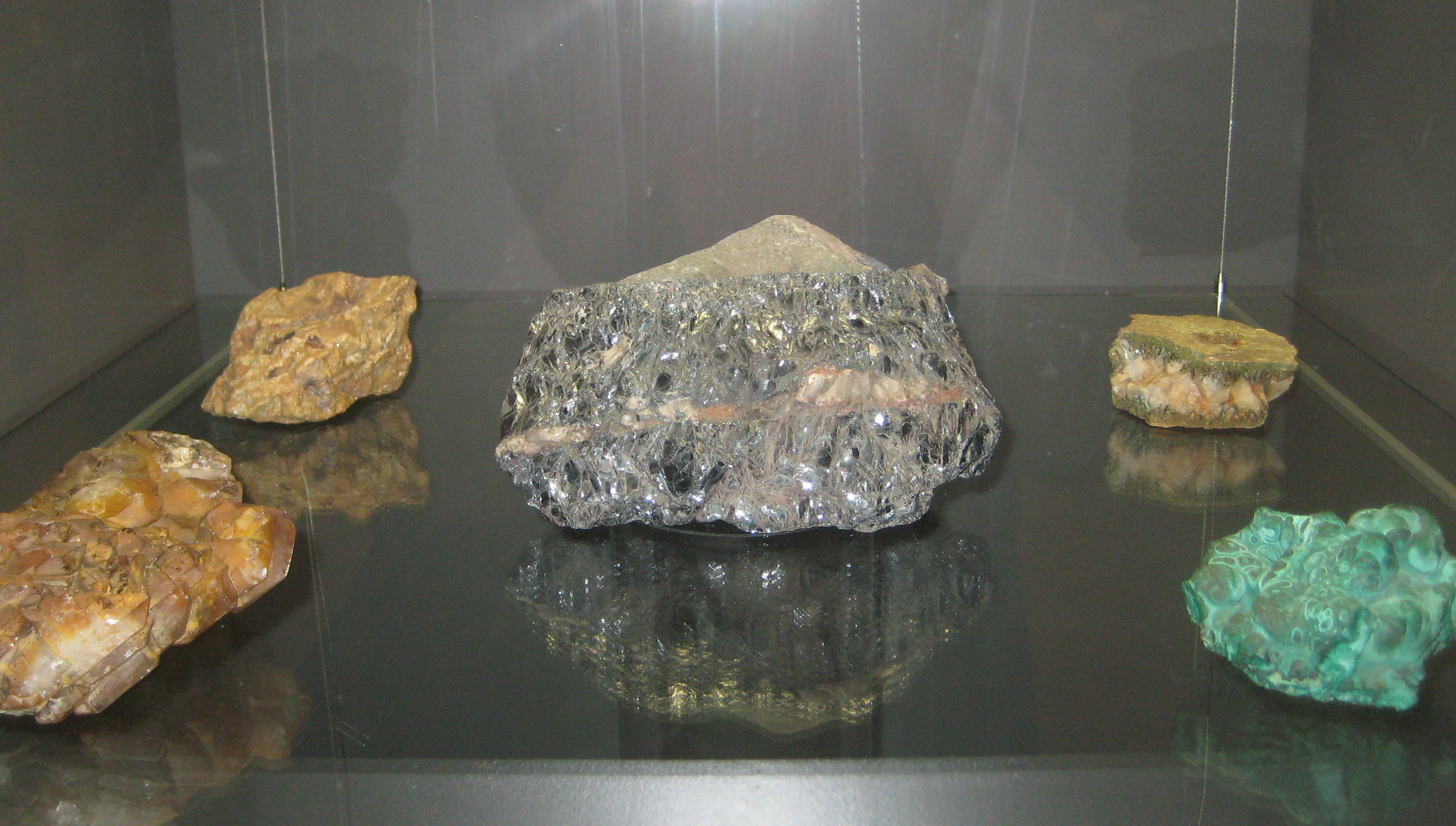 Материалы и руды из подарка Александра I Фридриху-Вильгельму III Малахит, Гумешевский рудник, Урал Эпидот, кварц, Киприно, Урал Кварц, Нижняя Тура, Урал Гематит, Онежское озеро, Карелия Смитсонит, Нерчинск, Сибирь Музей естествознания, Берлин. Выставка «Русские и немцы: 1000 лет истории, искусства и культуры». ГИМ (Москва)